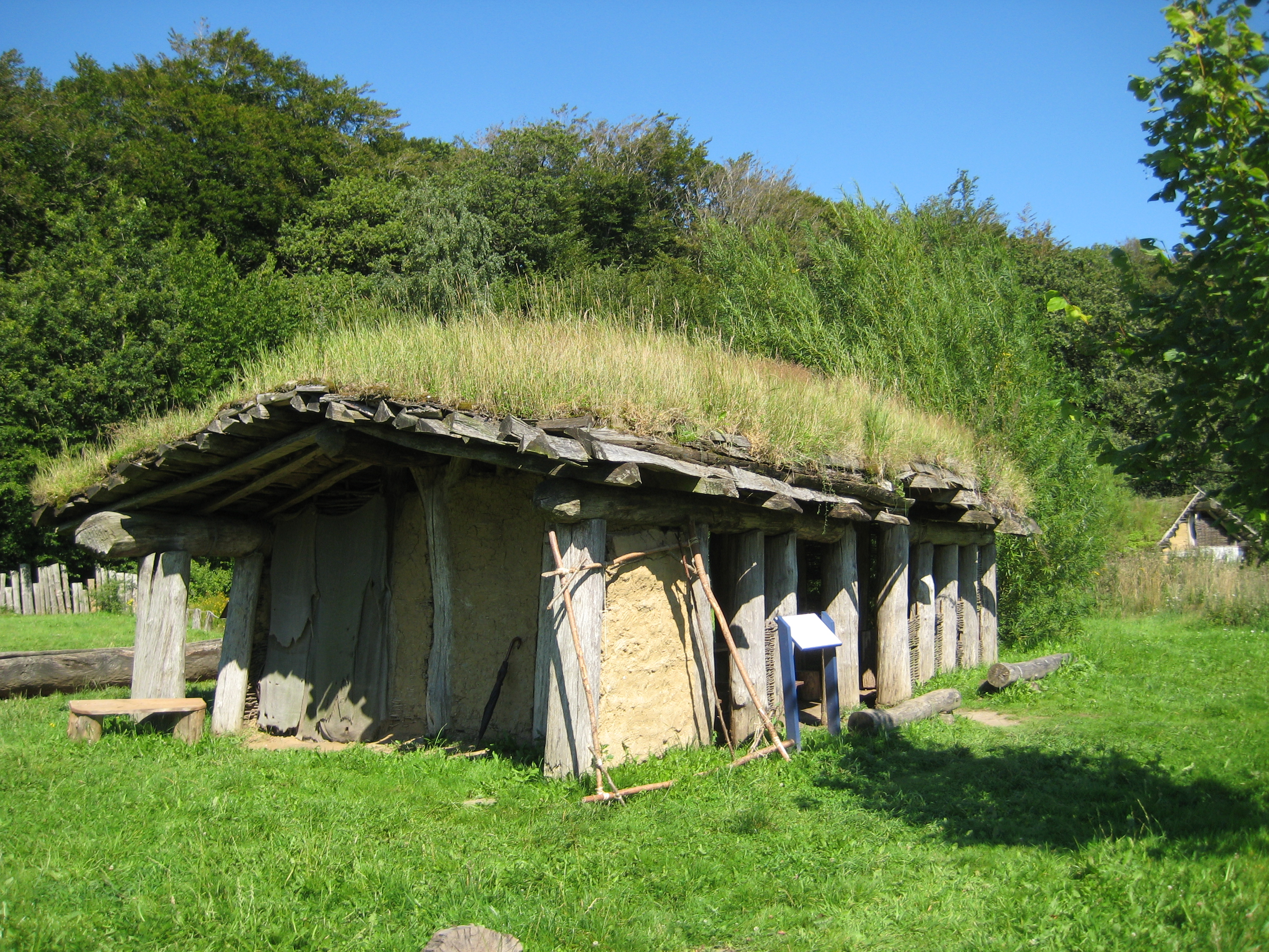 Fotos aus dem Naturerlebnisraum Archäologisch-Ökologisches Zentrum Albersdorf Impressionen im Gelände